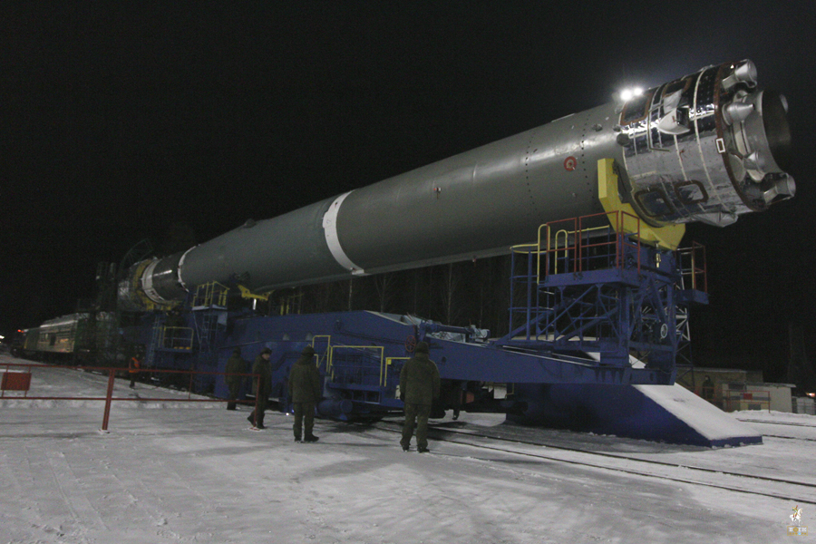 Воздушно-космические силы провели успешный пуск новой ракеты-носителя «Союз-2.1В» с космодрома Плесецк